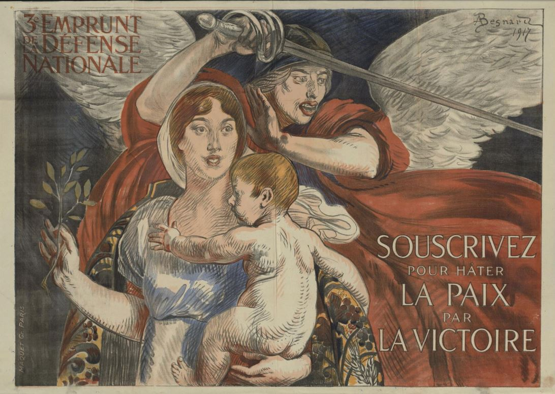 Emprunt d'Etat, emprunt de la Défense nationale 1917 France , affiche d'Albert Besnard